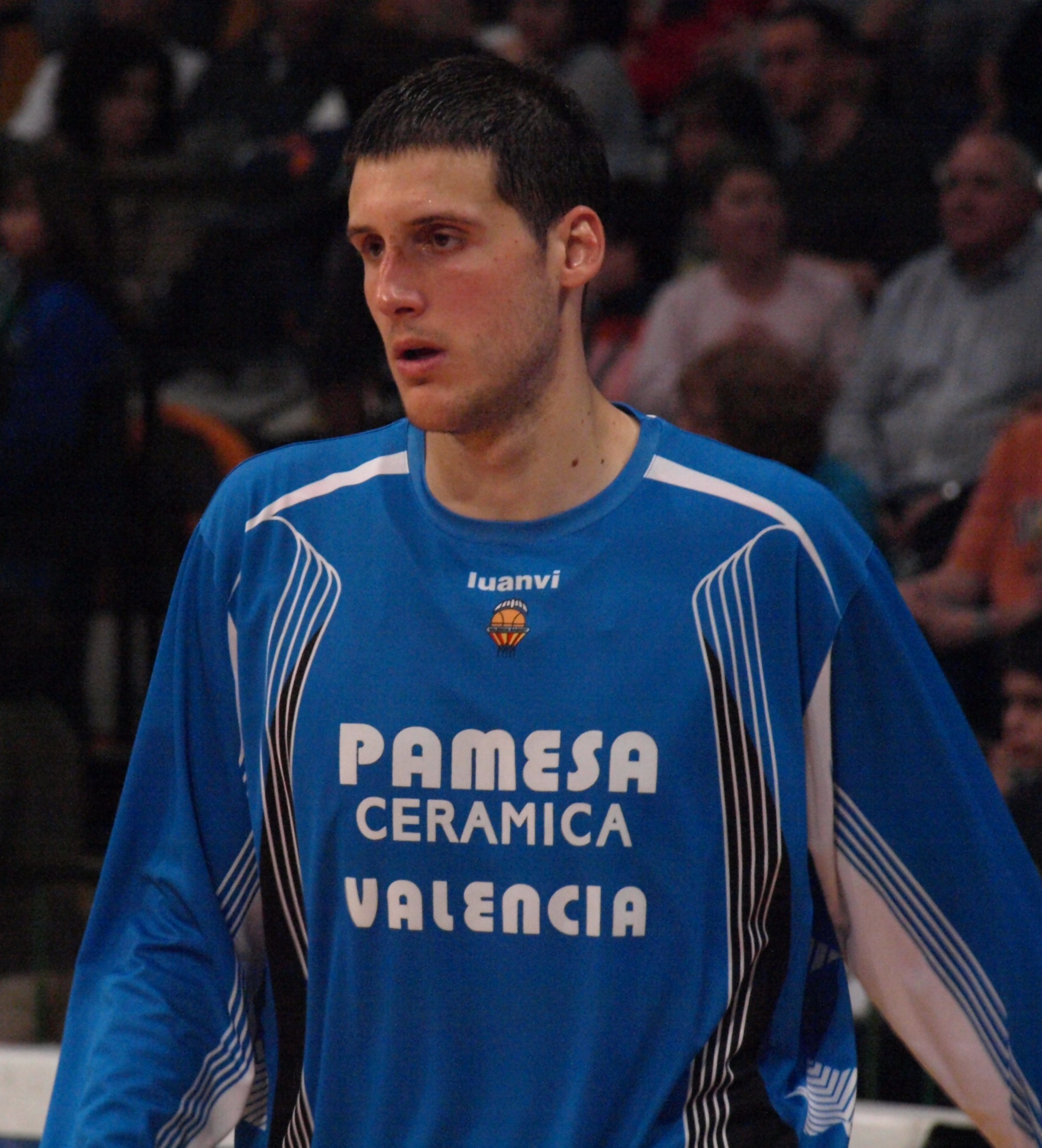 Kosta Perovic en el partido que enfrentó a su equipo, el Pamesa Valencia, al DKV Joventut de liga ACB en el Pabellón Olímpico de Badalona en abril de 2009.